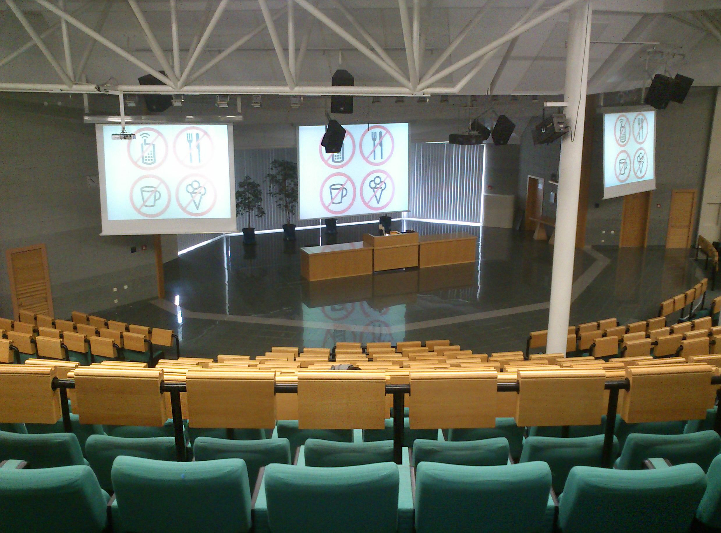 Vencovského aula na Vysoké škole ekonomické v Praze